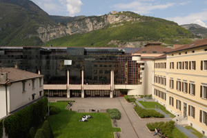 Dipartimento di Economia e Management - Università degli Studi di Trento